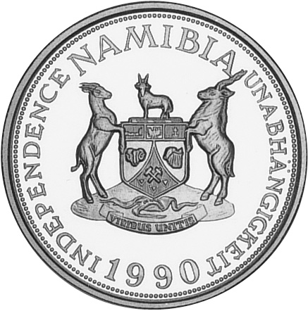 Die Namibia-Mark